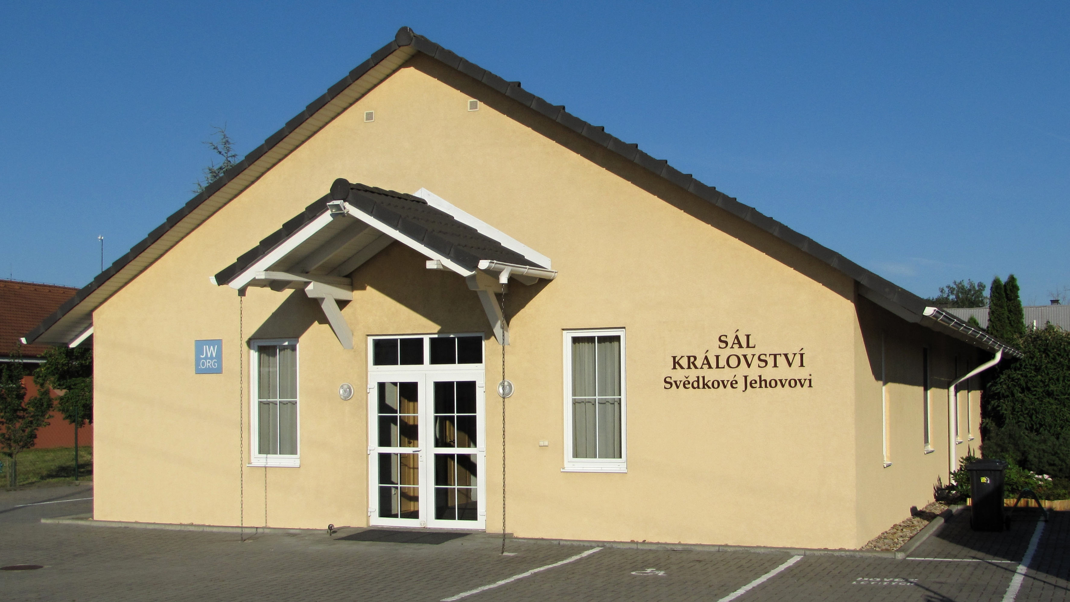 Sál království Svědků Jehovových na ulici Boršovská v Kyjově